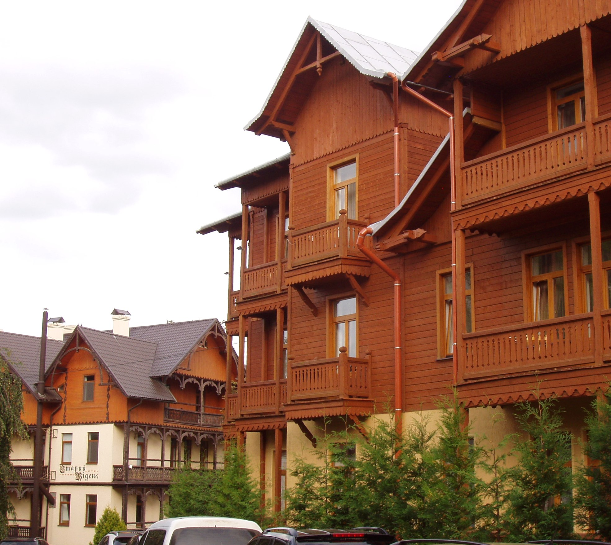 Вілла «Зося» (зміш.) - на задньому плані. Трускавець, бул. Юрія Дрогобича, 7